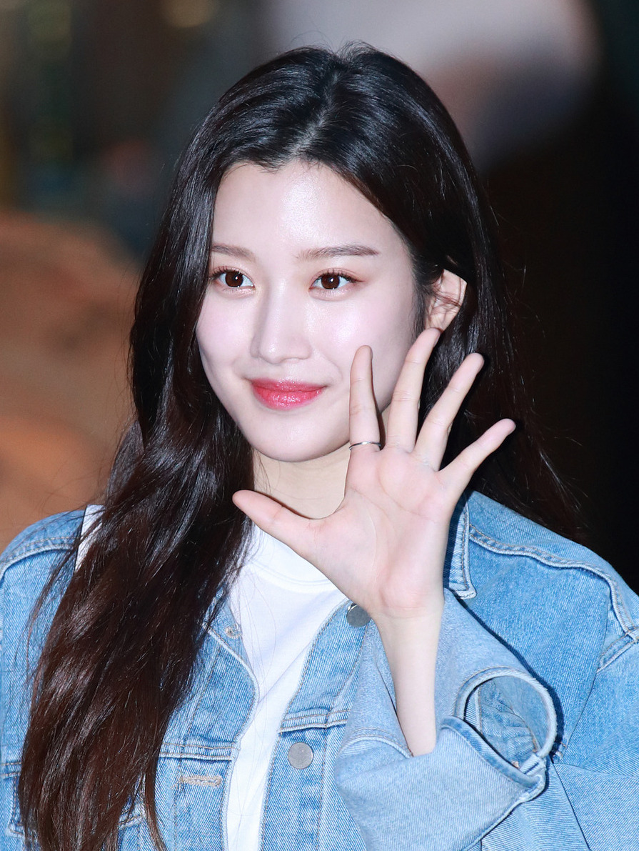 180501 문가영 위대한 유혹자 종방연